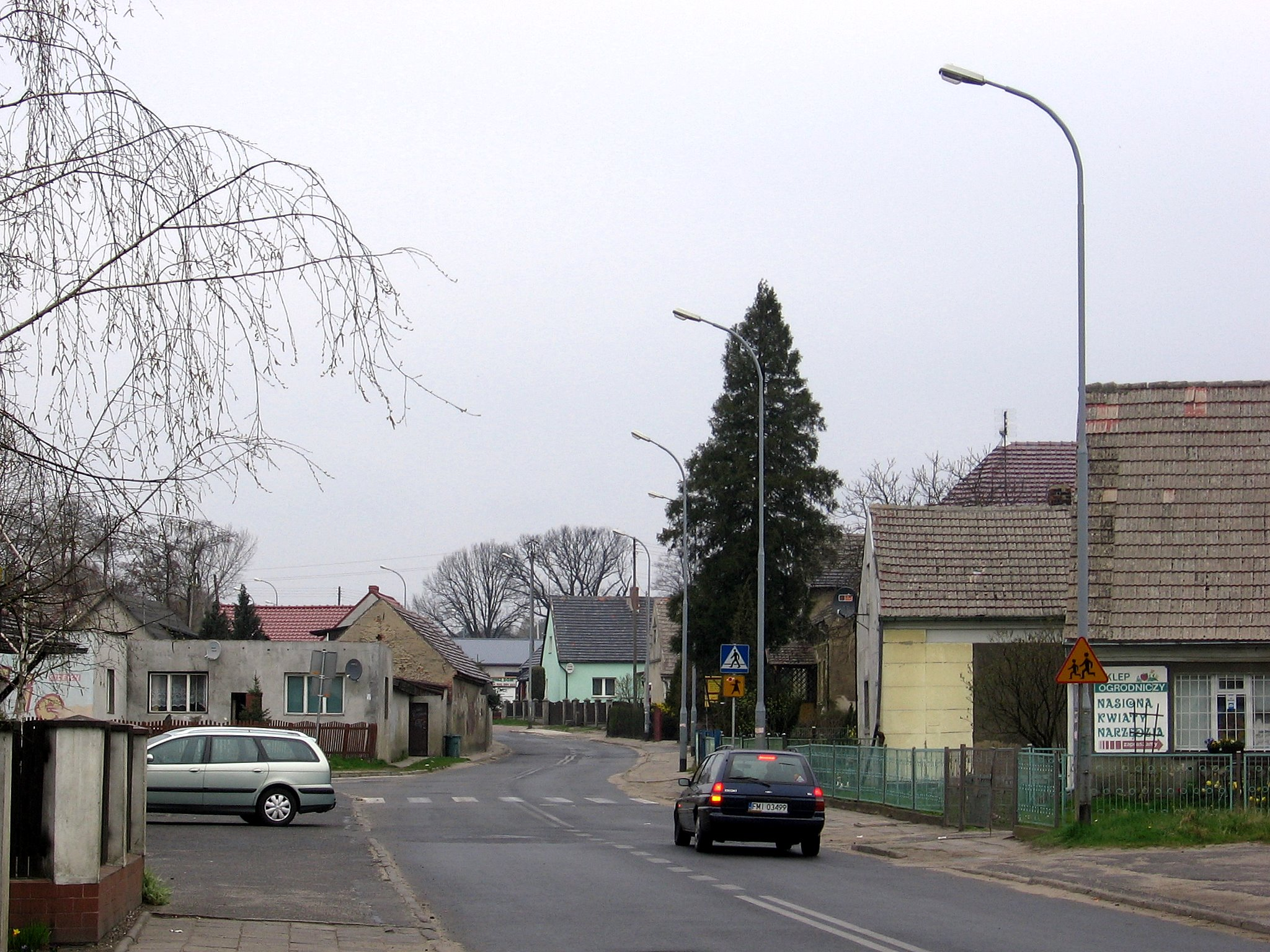 Jędrzychowska street, Zielona Góra, Poland